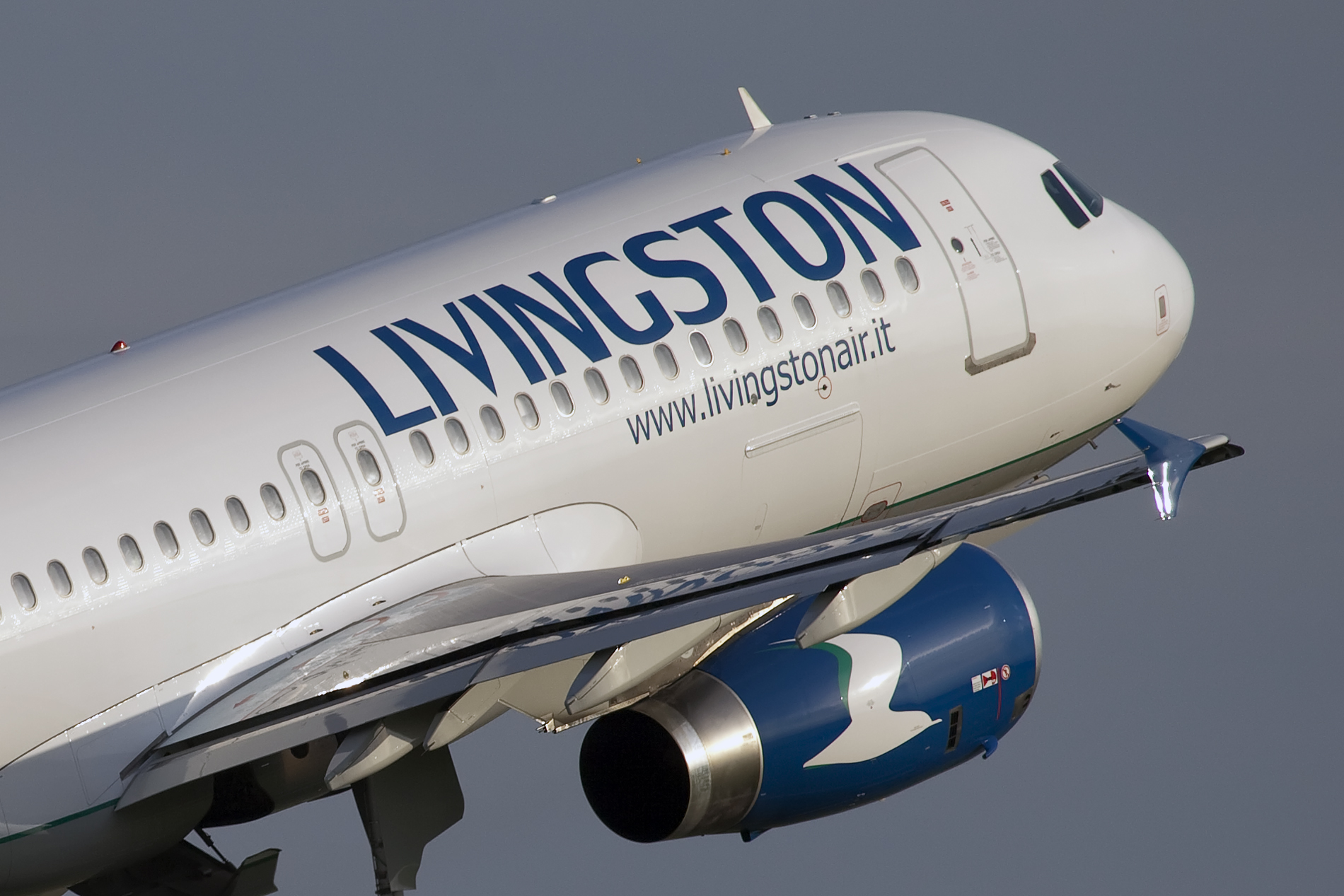 Rotterdam